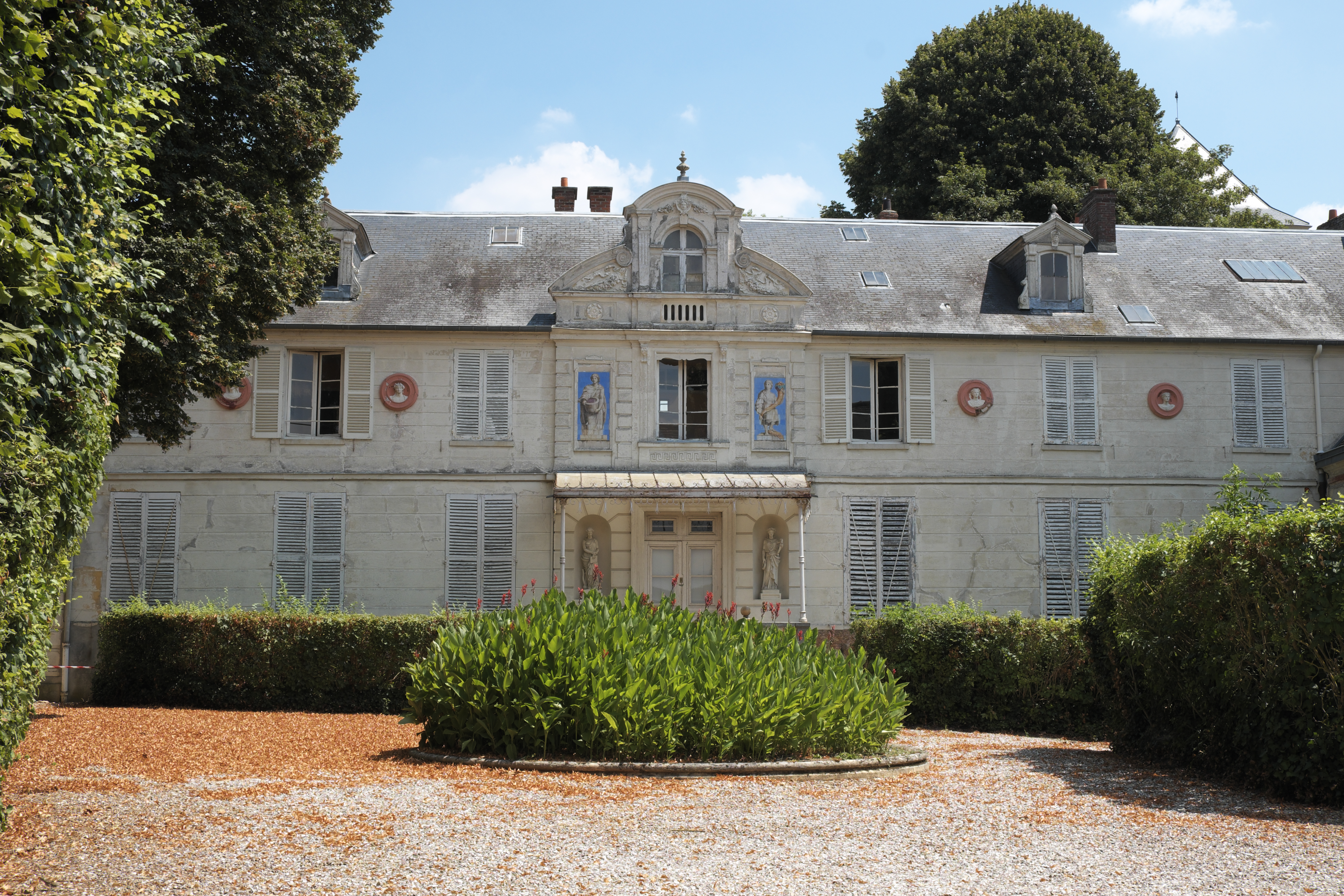 Ehemalige Abteigebäude in Neauphle-le-Vieux im Département Yvelines (Île-de-France/Frankreich)